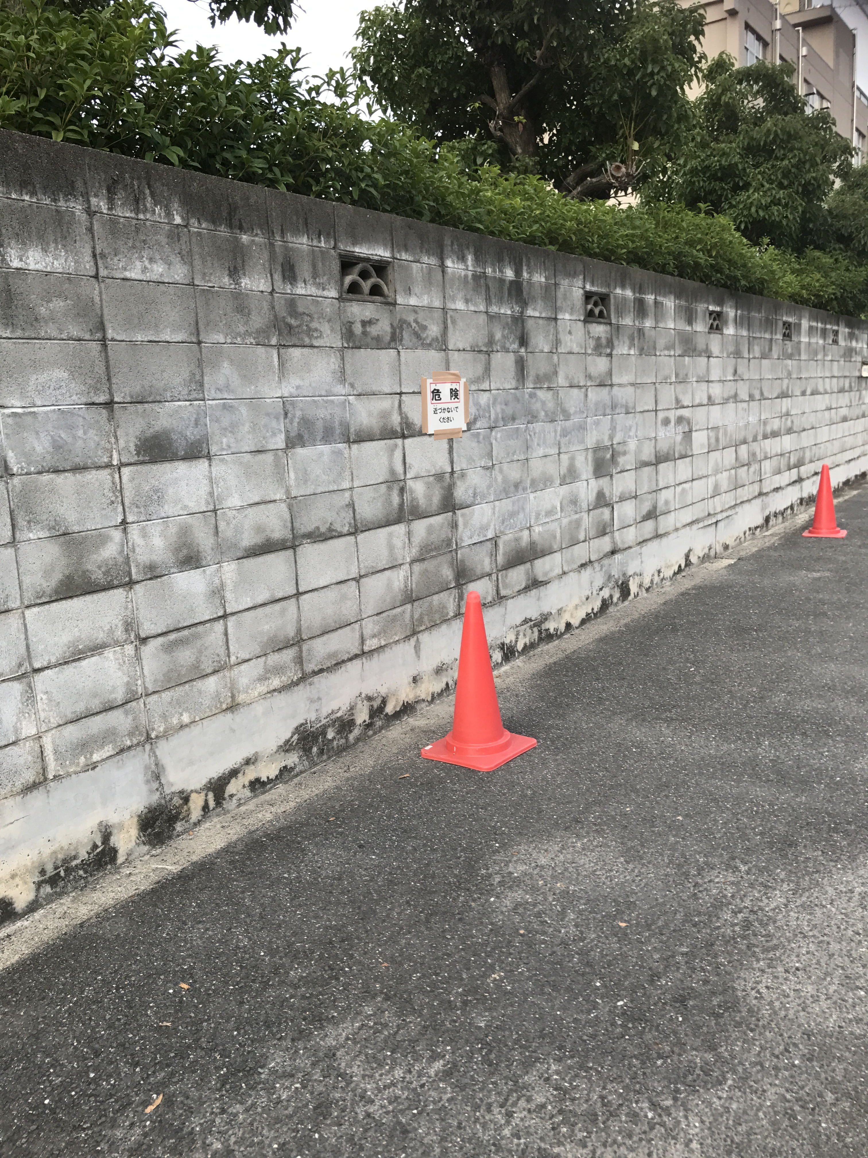 高槻市立松原小学校にて。ブロック塀の撤去作業が進められている。